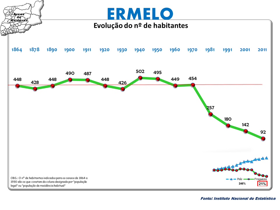 Censos 1864/2011